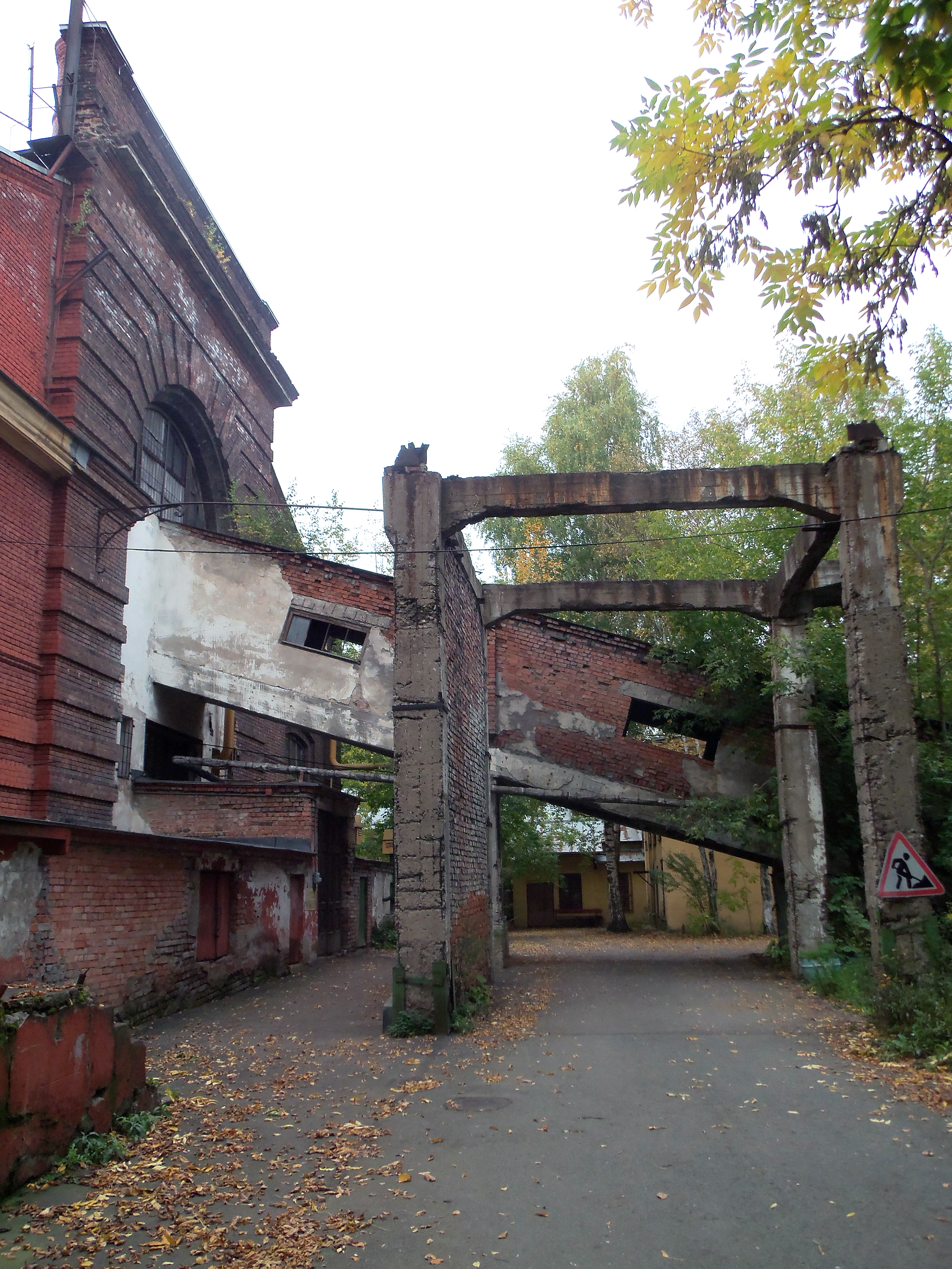 Котельная, где, по легенде, сожгли тело Распутина. Ныне находится в плохом состоянии.